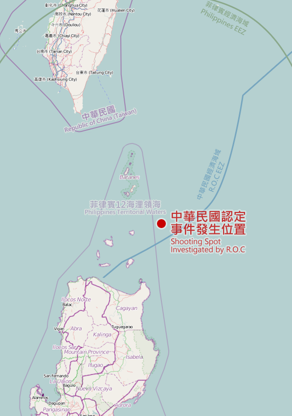 廣大興28號事件發生位置圖